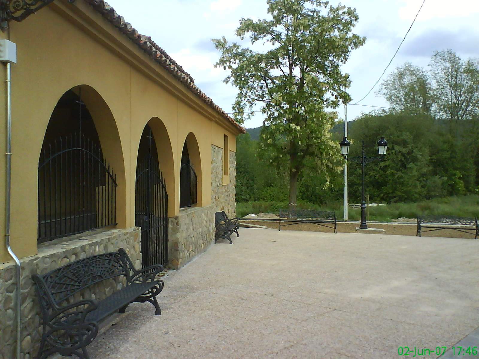 Plaza de la Iglesia de Santiago del Molinillo, en el municipio de Las Omañas (León, España)